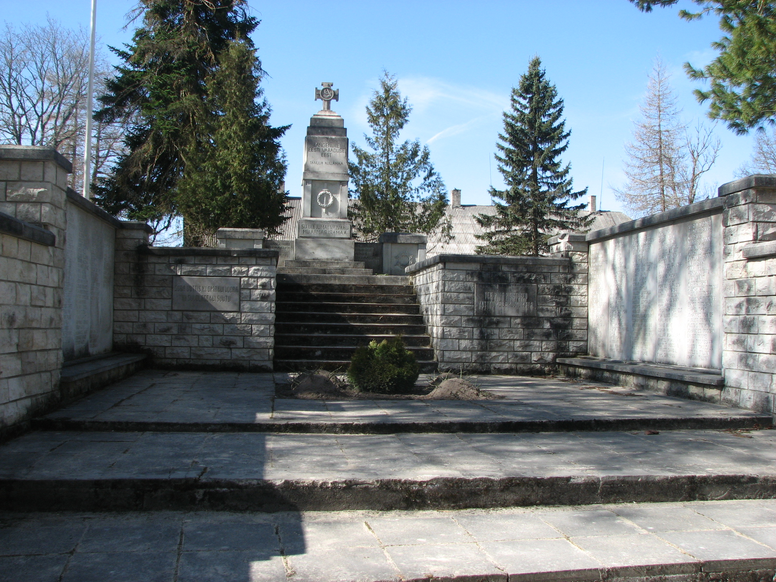 Vabadussõja mälestussammas Kullamaa külas